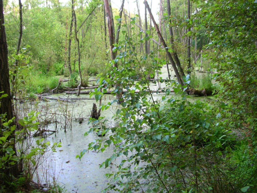 Rezerwat przyrody Augustowo, między Bydgoszczą, a Świeciem